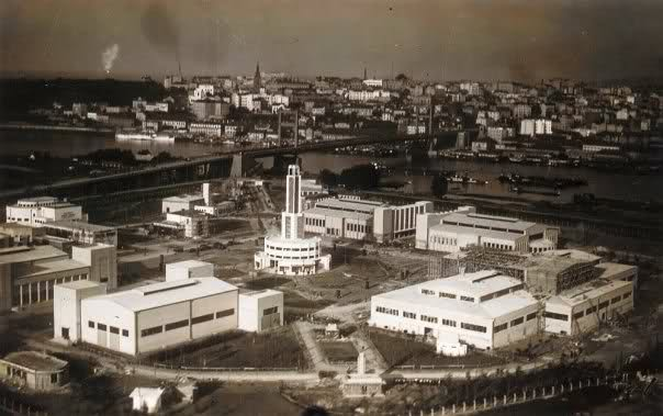 Београдски сајам је изграђен на основу одлуке Београдске општине 1936. године. Друштву за приређивање сајма и изложби је уступљен терен крај новоизграђеног Моста краља Александра. Прва фаза радова је започета у пролеће 1937. године, а завршена је до отварања, септембра 1937. Друга фаза, у којој су изграђени Турски и велики Немачки павиљон, завршена је 1938. Планирана је изградња и шестог југословенског павиљона, али су радови обустављени због избијања Другог светског рата. За време Другог светског рата га је Гестапо користио као концентрациони логор у ком је страдало око 48.000 људи.